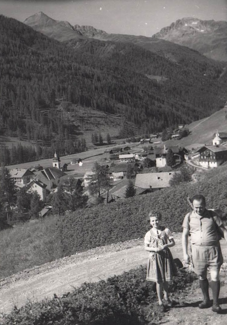 St. Jakob im Defereggental, Osttirol, 1956, mit Wiener Urlaubsgästen auf einer Wanderung